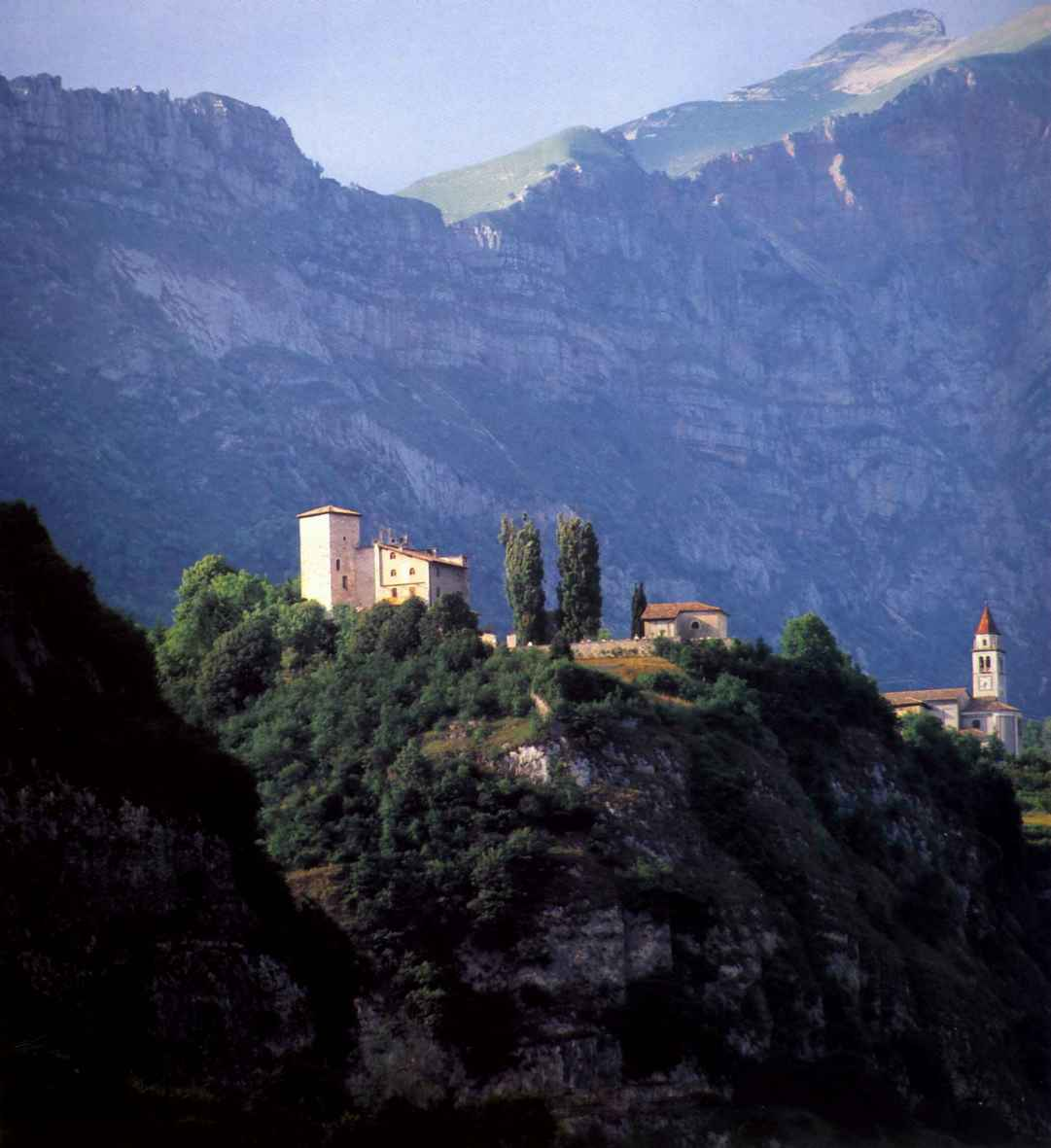 Villa Lagarina, il maniero di Castellano